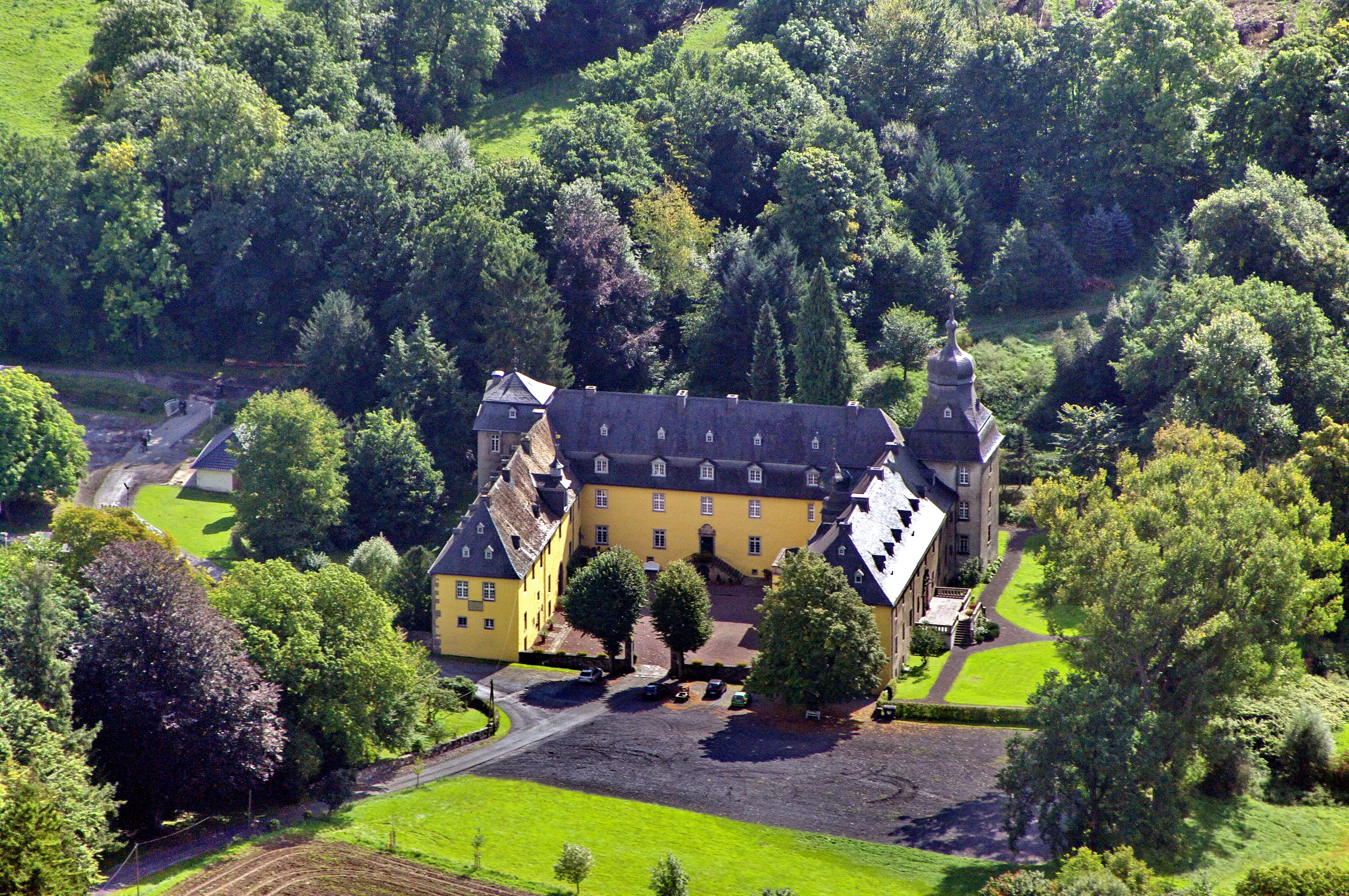 Schloss Melschede, Sundern Langscheid, Luftbild 2008